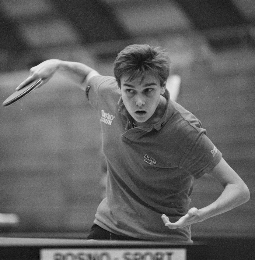 NK tafeltennis in Amsterdam; Bettine Vriesekoop die 3 titels behaalde.